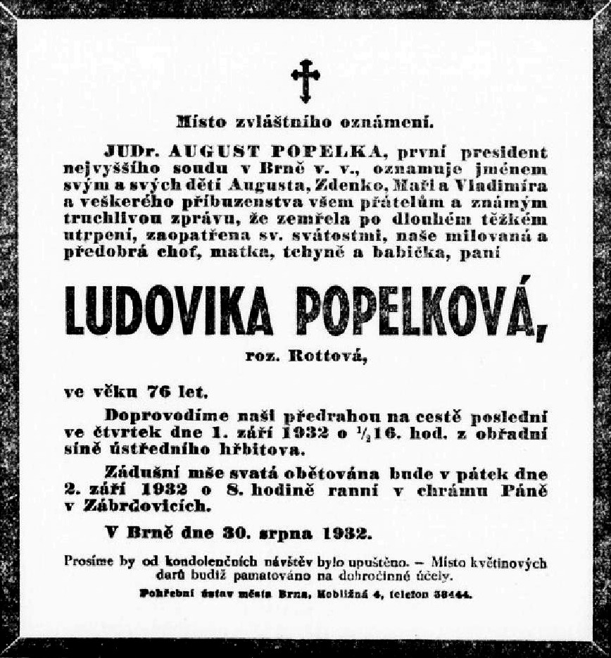 Oznámení o úmrtí Ludviky Popelkové roz. Rottové v dobovém tisku (Lidové noviny Datum vydání 31.8.1932)